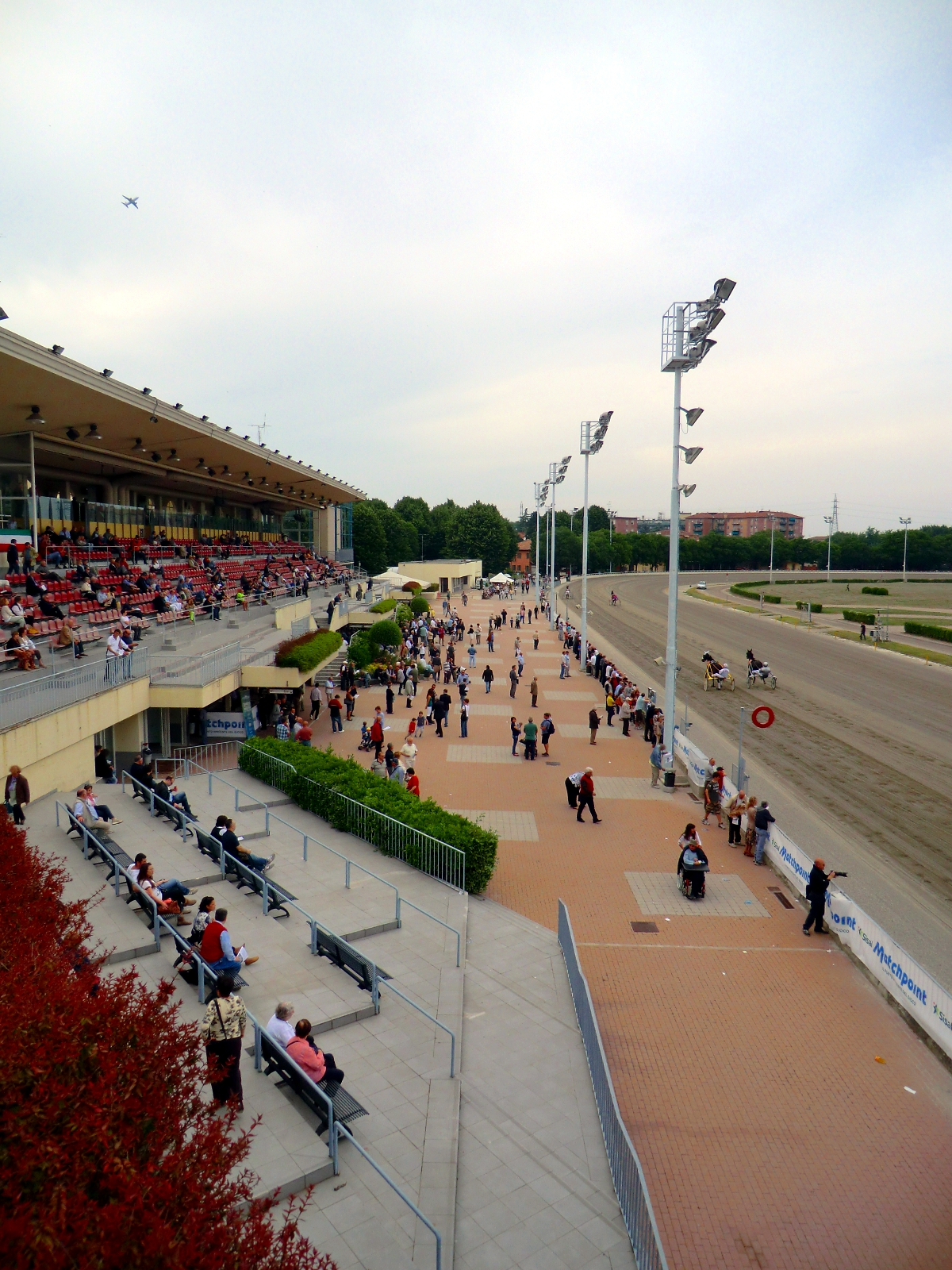 Foto scattata durante le gare - Gran Premio della Repubblica all'Ippodromo dell'Arcoveggio, Bologna.